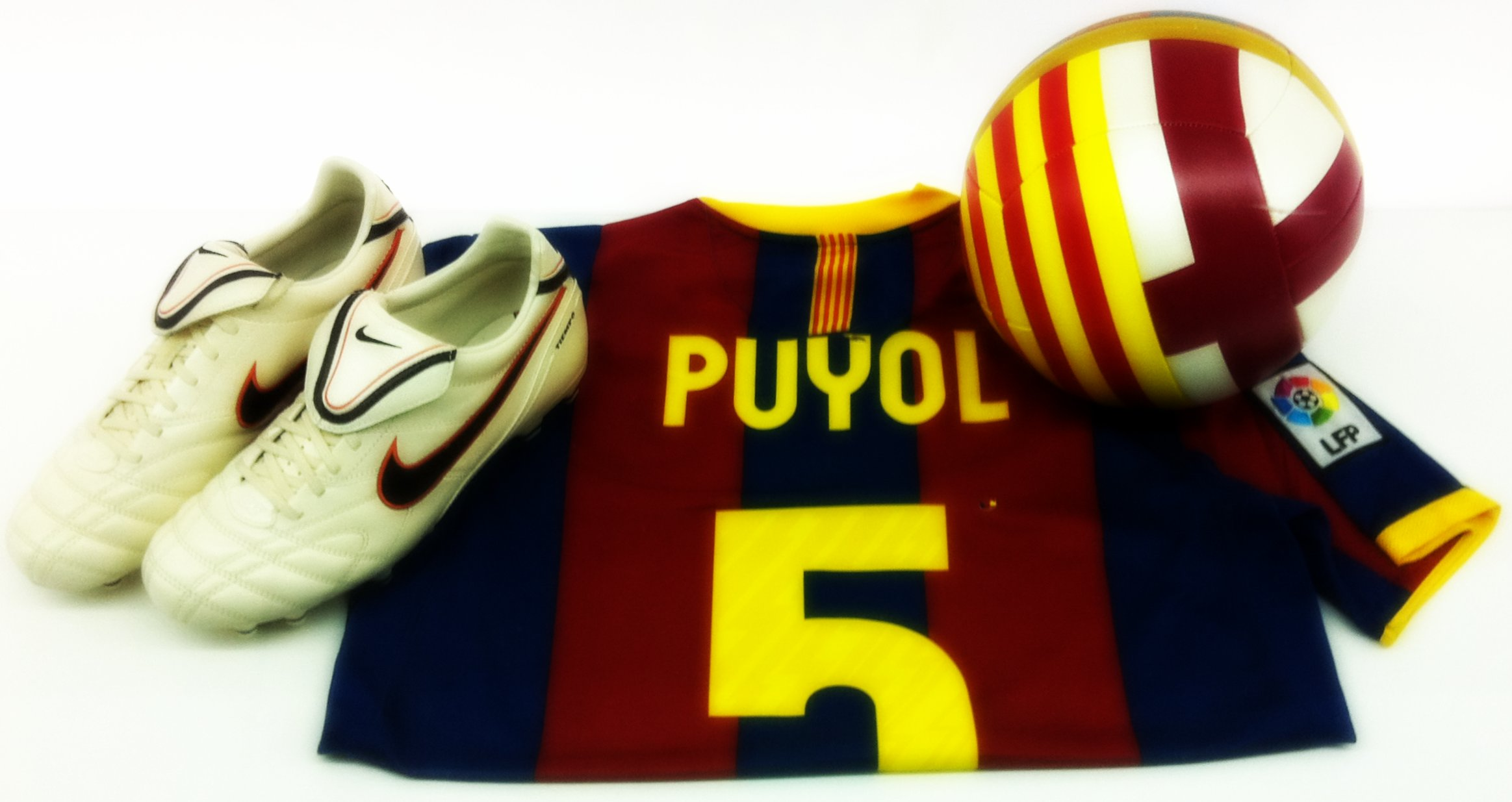 Camiseta y zapatillas de Puyol, en el museo del FC Barcelona.